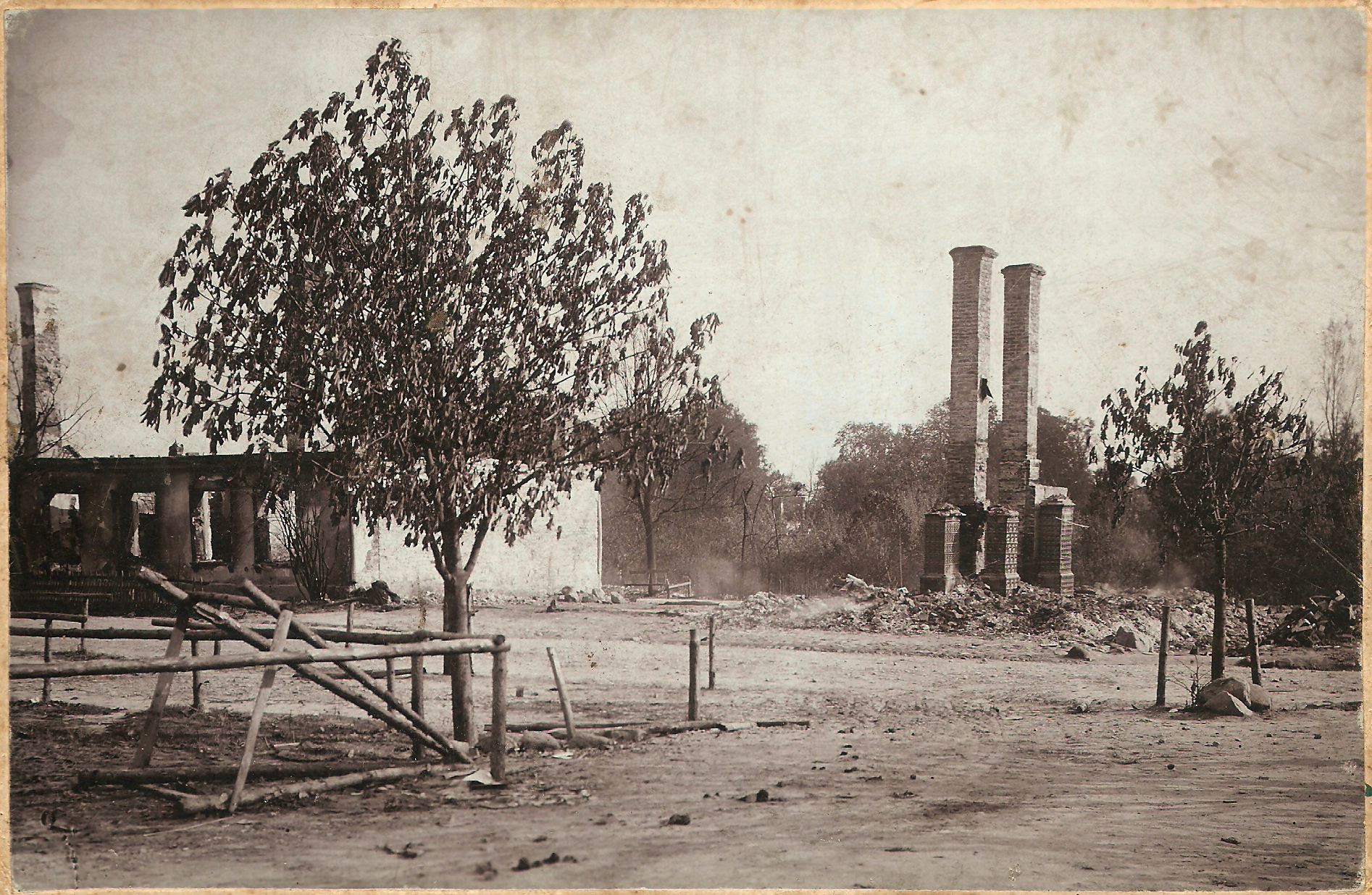 Południowo-zachodni narożnik rynku w Sokołowie po pożarze 25-26 lipca 1904 r. Po lewej ruiny dawnej apteki. Zdjęcie wykonane przez Edwarda Janusza z Rzeszowa "Cesarskiego i królewskiego nadwornego fotografa" (K.u.K. Hof-Fotograf)